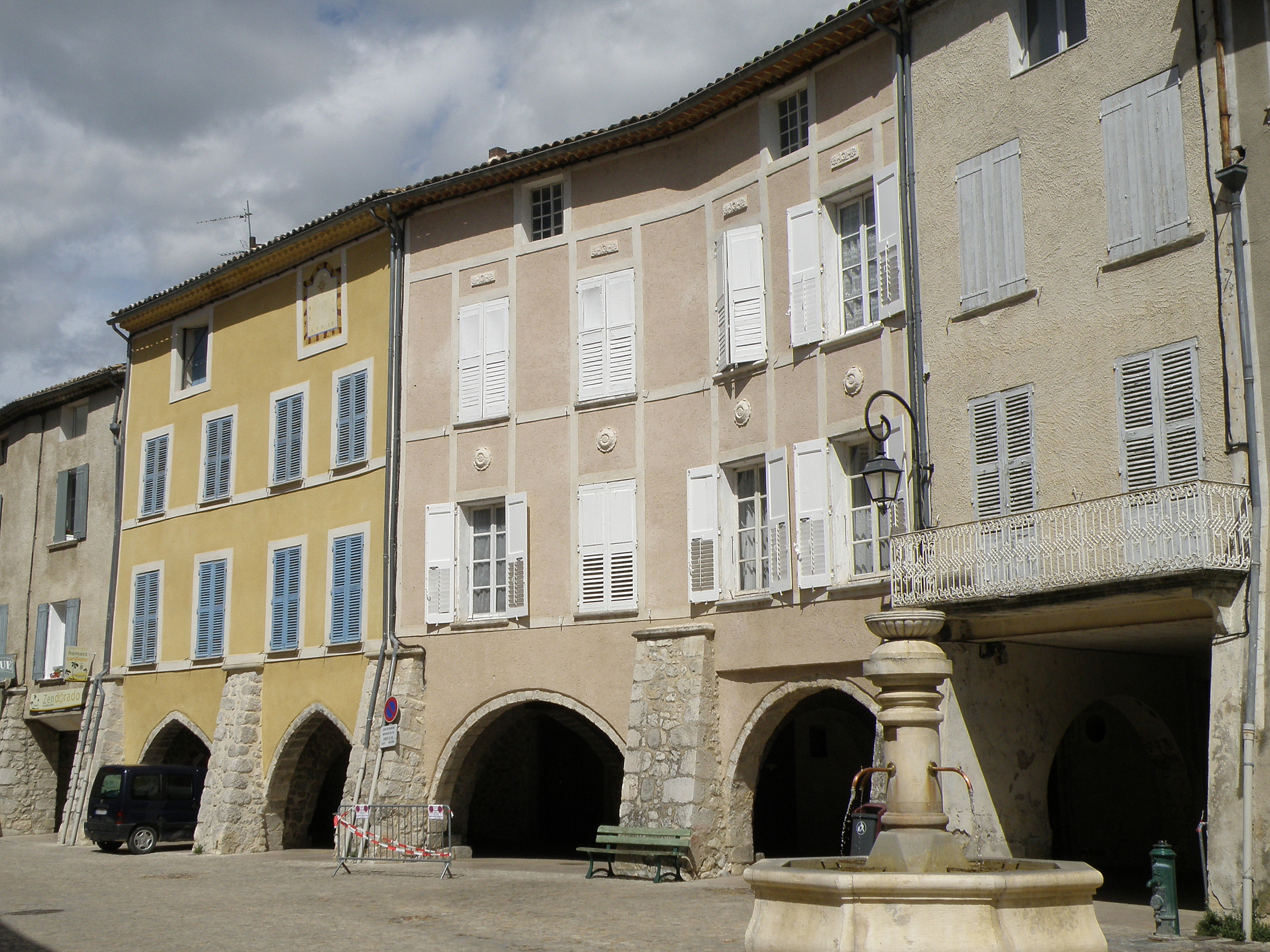 Buis-les-Baronnies (Drôme, France). Place des Arcades ou place du Marché, dans le vieux bourg. Arcades du XVe siècle.